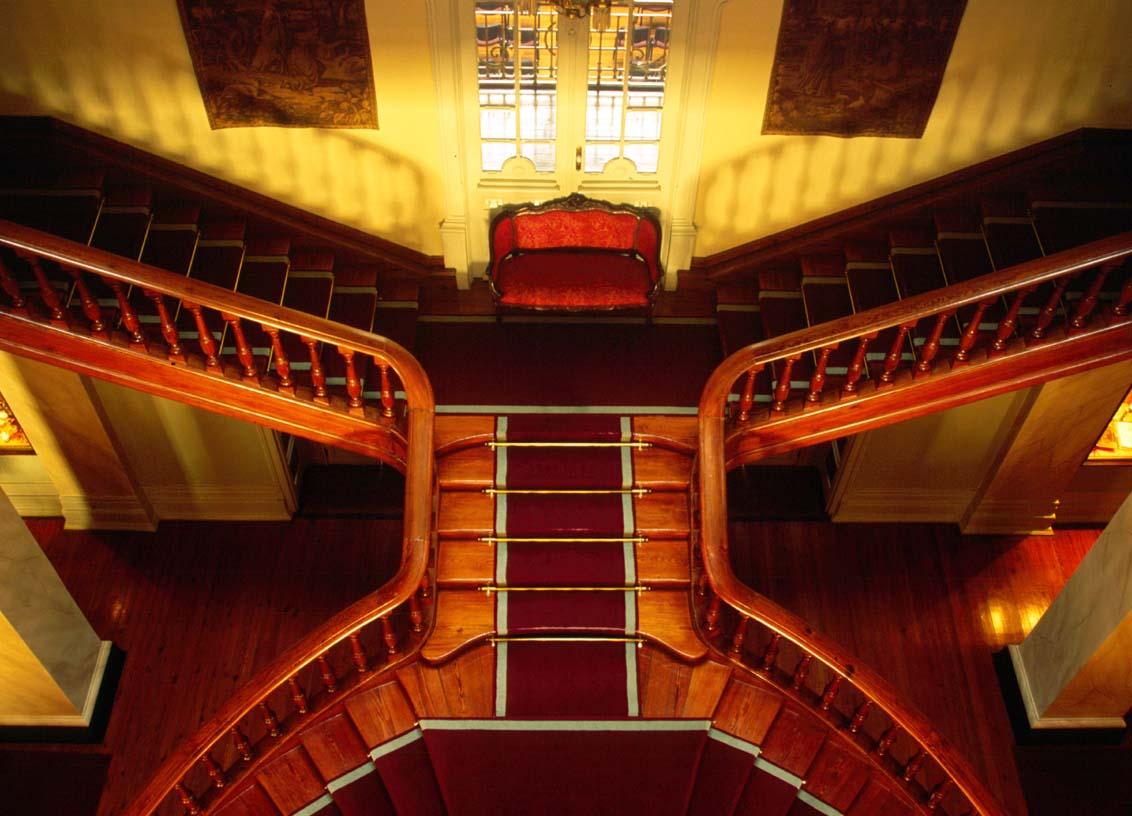 hotel Vidago palace